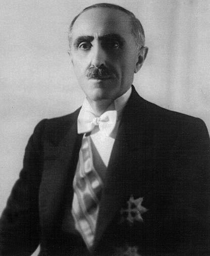 Foto ufficiale di S.E. Shefqet Verlaci